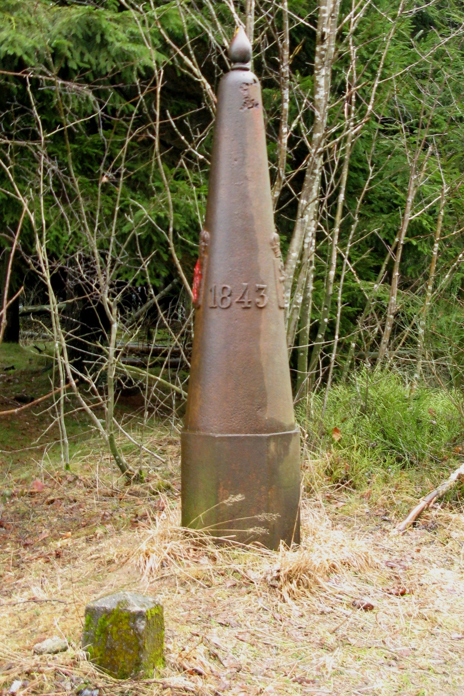 D'Gossemaark N° 284 op Gässert bei Huldang.